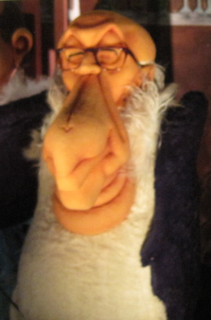 Le Bébête show - Exposition de marionnettes de la citadelle de Besançon